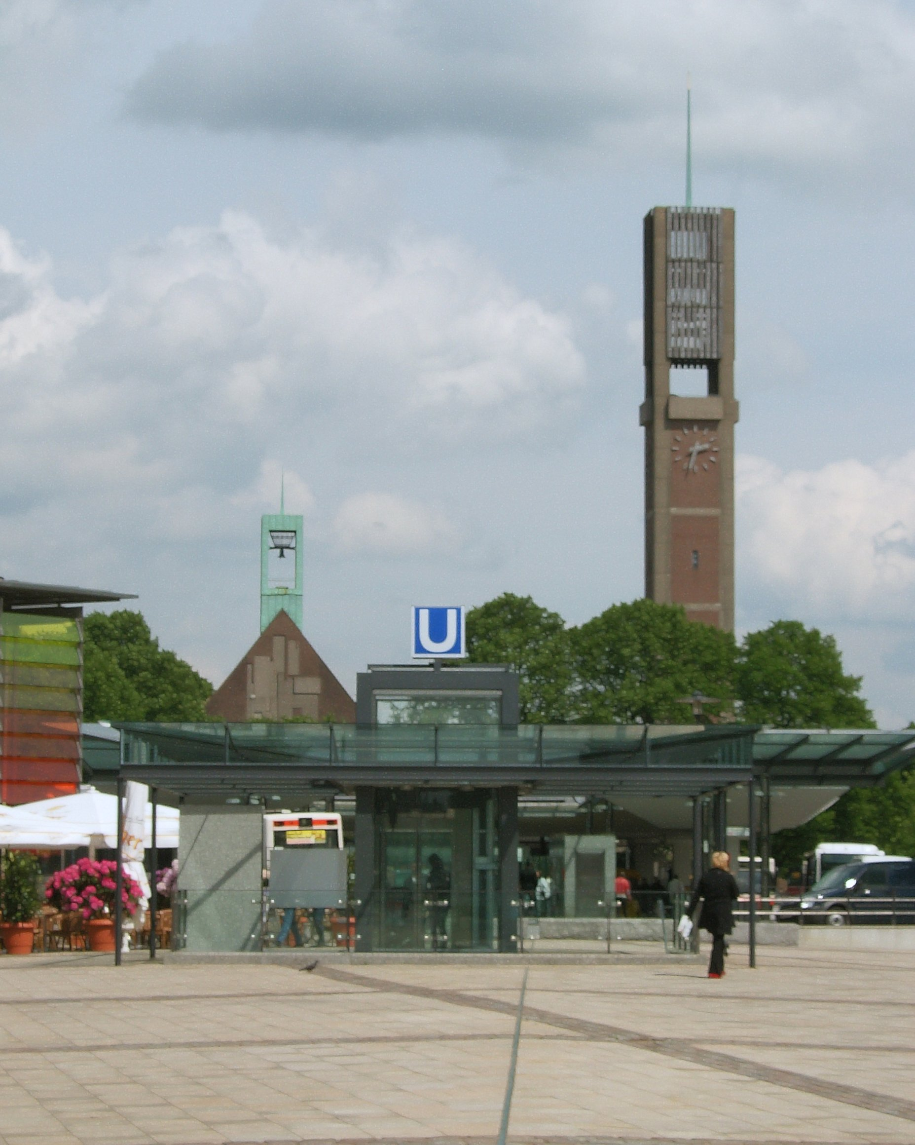 Blick über den Eingang des U-Bahnhofes Wandsbek Markt auf die Christuskirche. This is a photograph of an architectural monument.